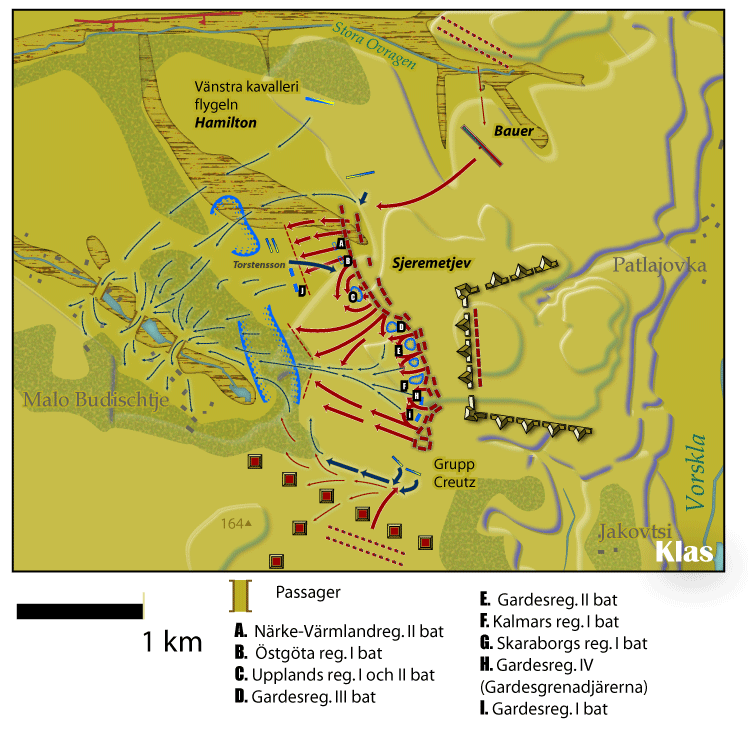 Illustration: Klas Sandberg. Källa: Karl XII på slagfältet